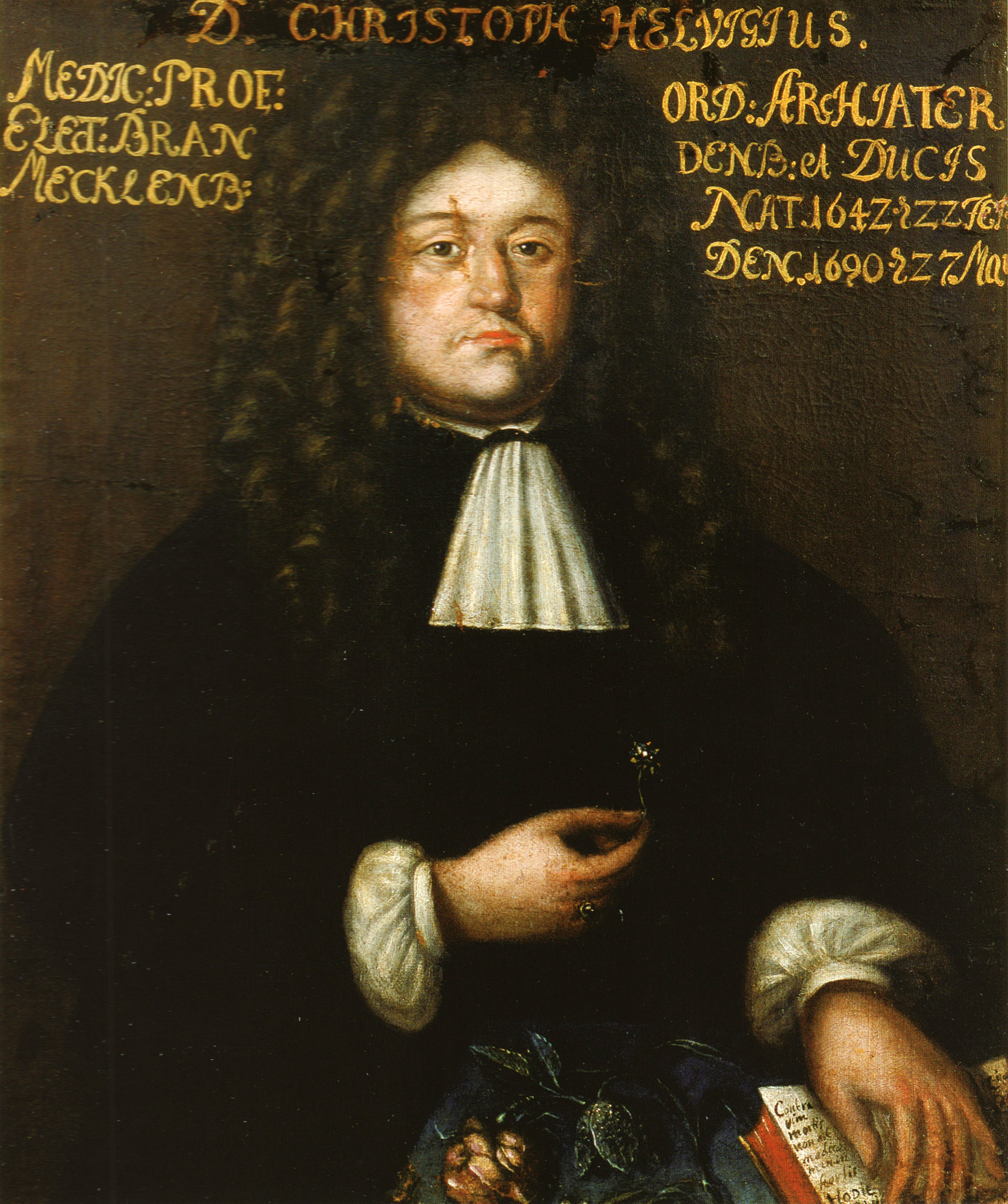 Ölgemälde von Christoph Hellwig